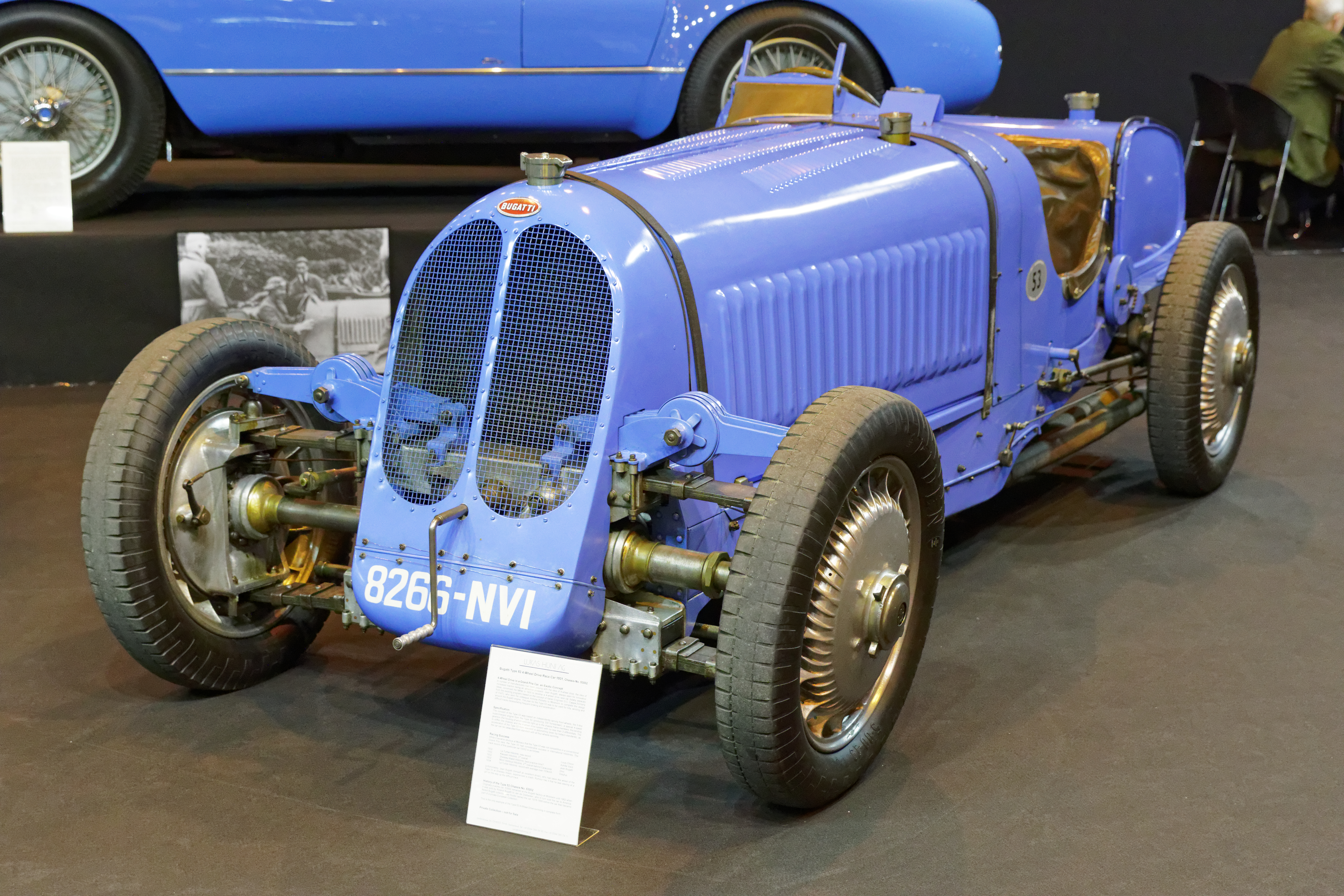 Une des voiture présentée lors du salon Rétromobile de Paris 2015